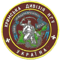 Нарукавна нашивка 7-мої (Кримської) дивізії національної гвардії України (варіант 4)